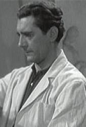 Mirko Eliáš (1899 - 1938), Český herec, malíř, básník a žurnalista.